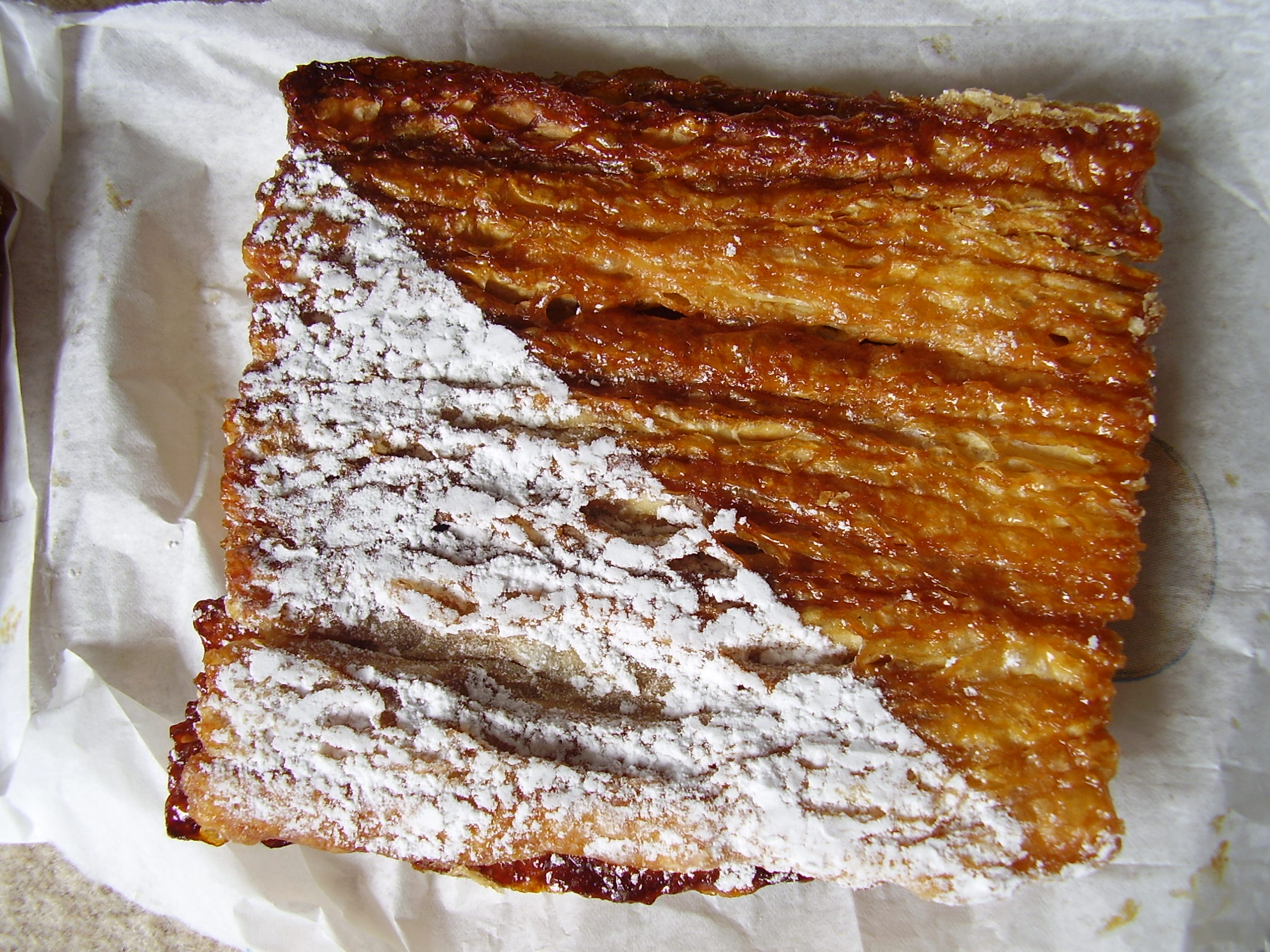 French cooky from puff pastra with Marmalade; Une « paille », spécialité nantaise ayant donnée naissance au « Pailles d'or » de LU qui n'ont pourtant rien à voir. La « paille » est formée de deux pâtes feuilletées (surtout pas de pâte phyllo), uniquement au beurre 1/2 sel (surtout pas de margarine, à la limite du beurre doux) entre lesquelles il y a une confiture de fraise, de framboise ou d'abricot, le tout saupoudré de sucre glace. Un régal ! Les « Pailles d'or » de LU n'ont plus grand chose à voir puisqu'il s'agit d'une pâte gaufrée très fine. A "straw", specialty of Nantes. The "straw" consists of two puff pastries made with 'half-salted' butter (never use margarin, unsalted butter is permitted); between them is spread a strawberry jam, raspberry or apricot, all powdered with sugar ice. A feast! "Golden straws" from LU (french industrial bakeries) were initially inspired from it, but their recipe presently differ too much from the real original cookie.